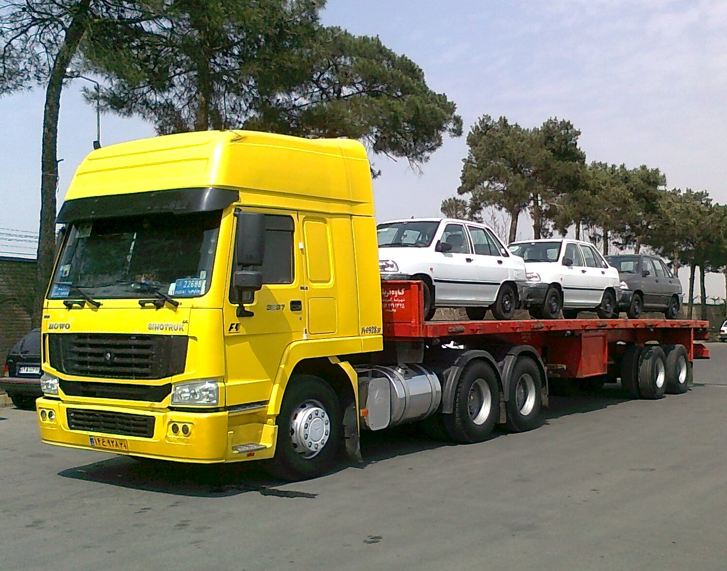 کامیون هوو در حال انتقال خودروی پراید